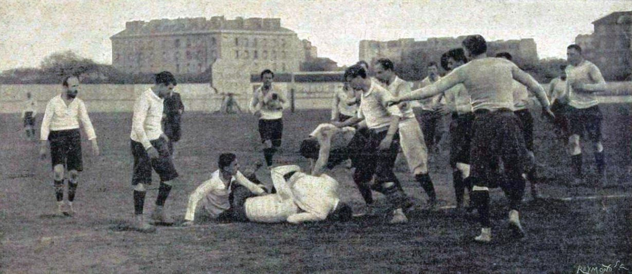 Finale du championnat de France de rugby 1902, un tenu du Stade bordelais par le RCF.